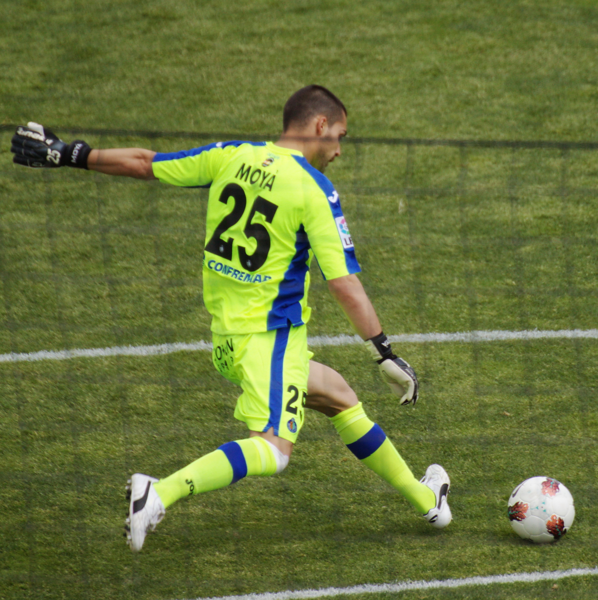 Miguel Ángel Moyà Rumbo sacando un saque de puerta como portero del Getafe Club de Fútbol